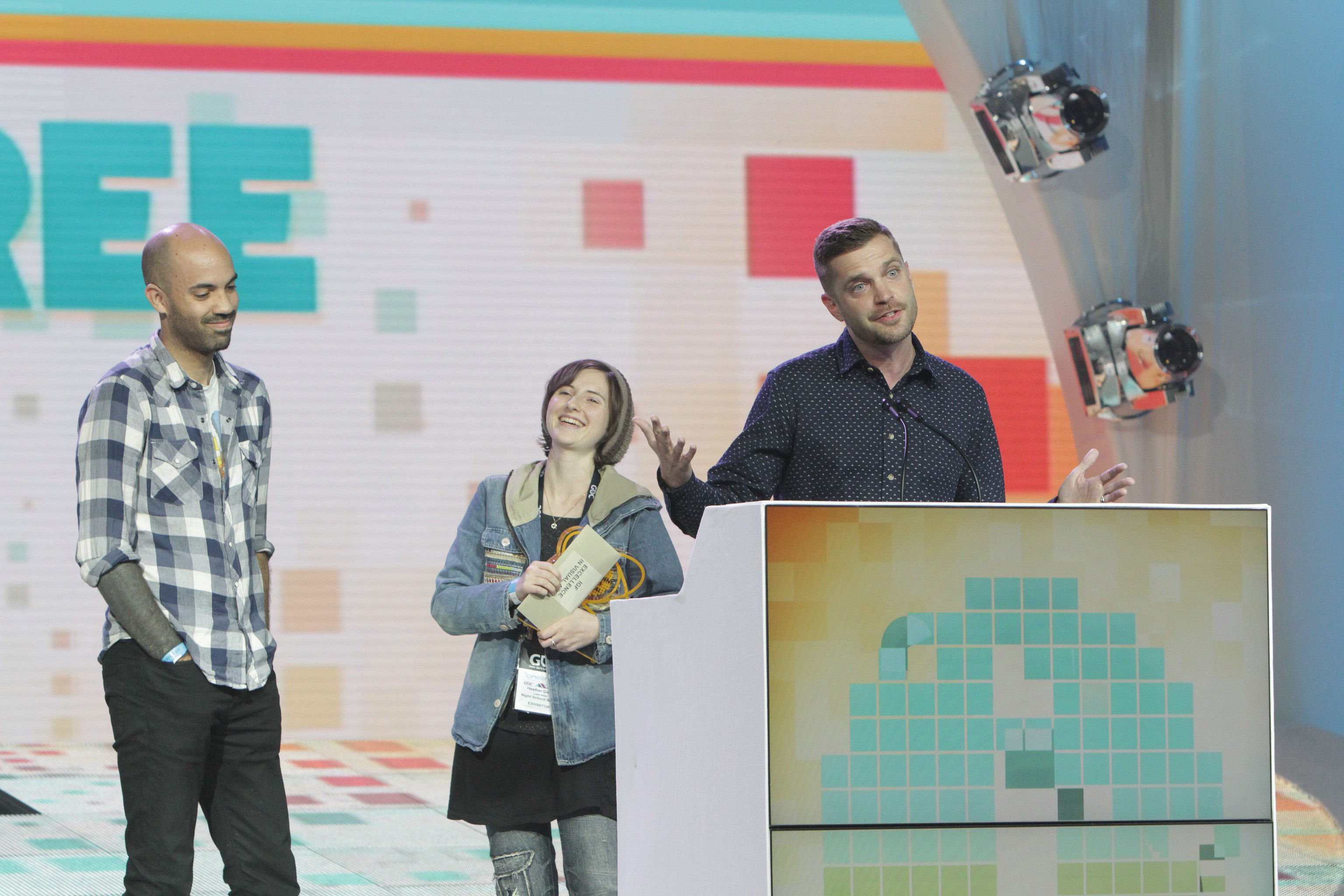 16-19_02_38-01-7D1_1044